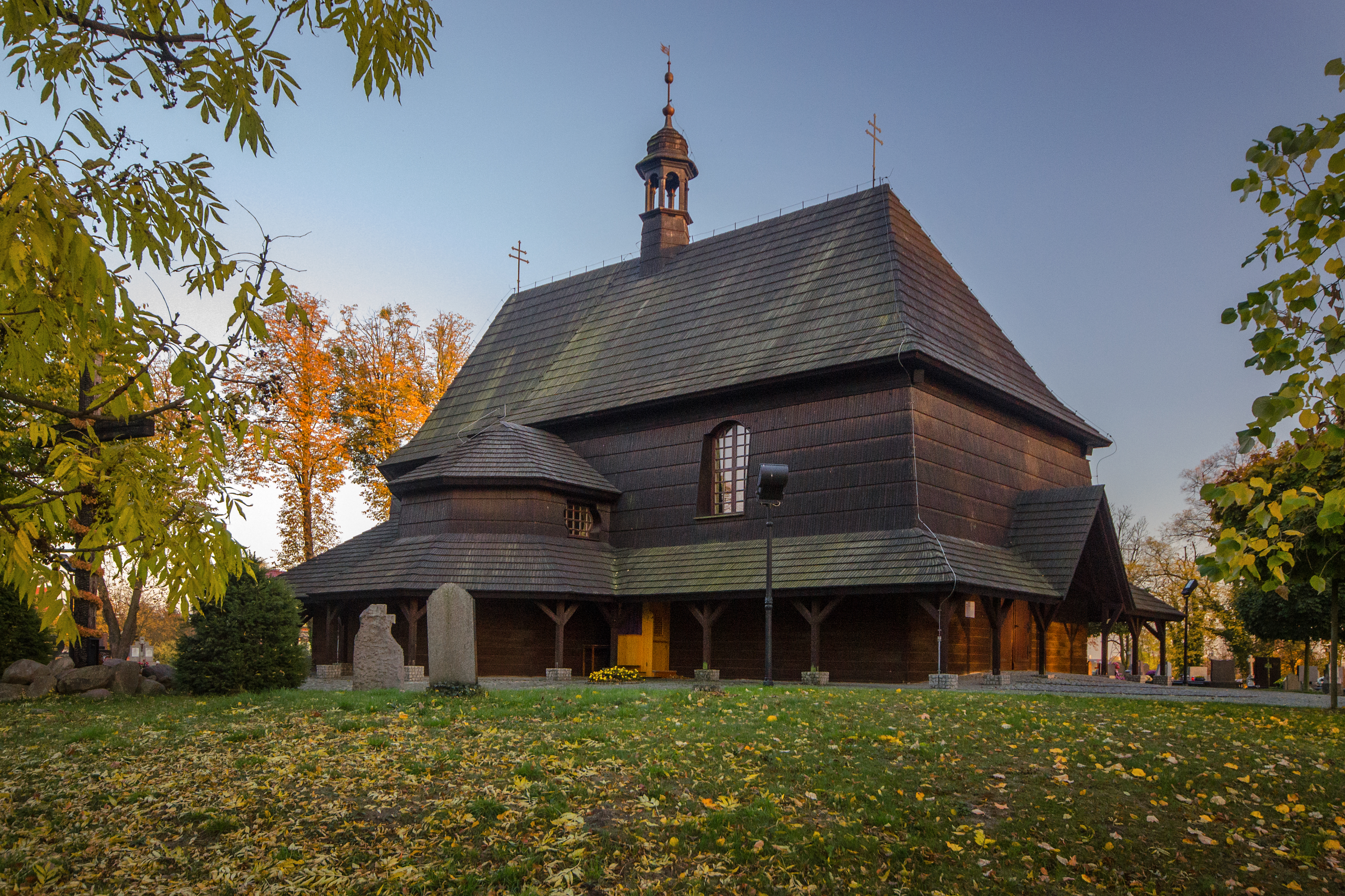 Kościół św. Anny, Czarnowąsy, gm. Dobrzeń Wielki, pow. opolski, woj. opolskie